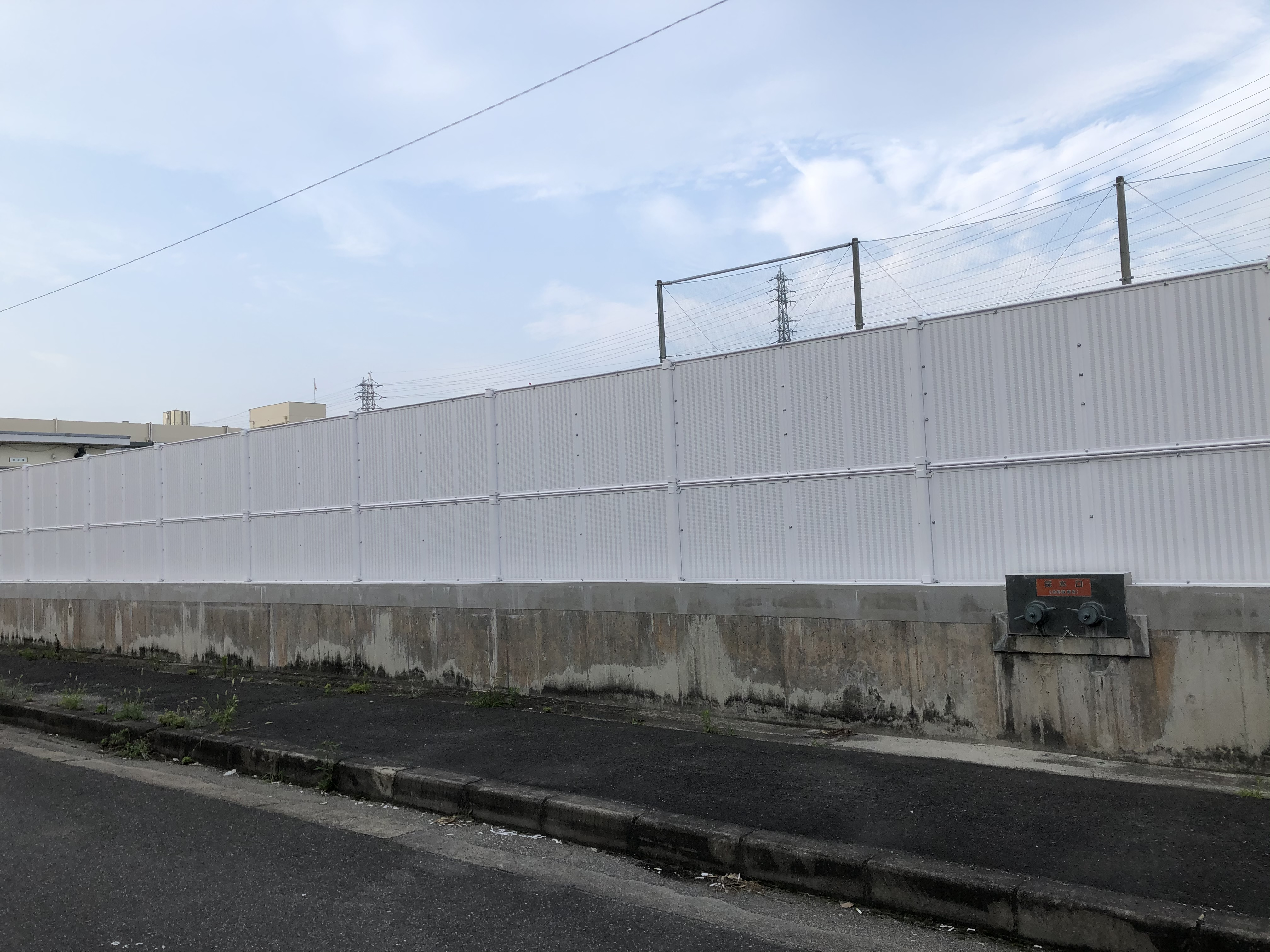 本校では、ブロック塀の崩落の危険性から、プールはフェンスにより囲われるようになった。